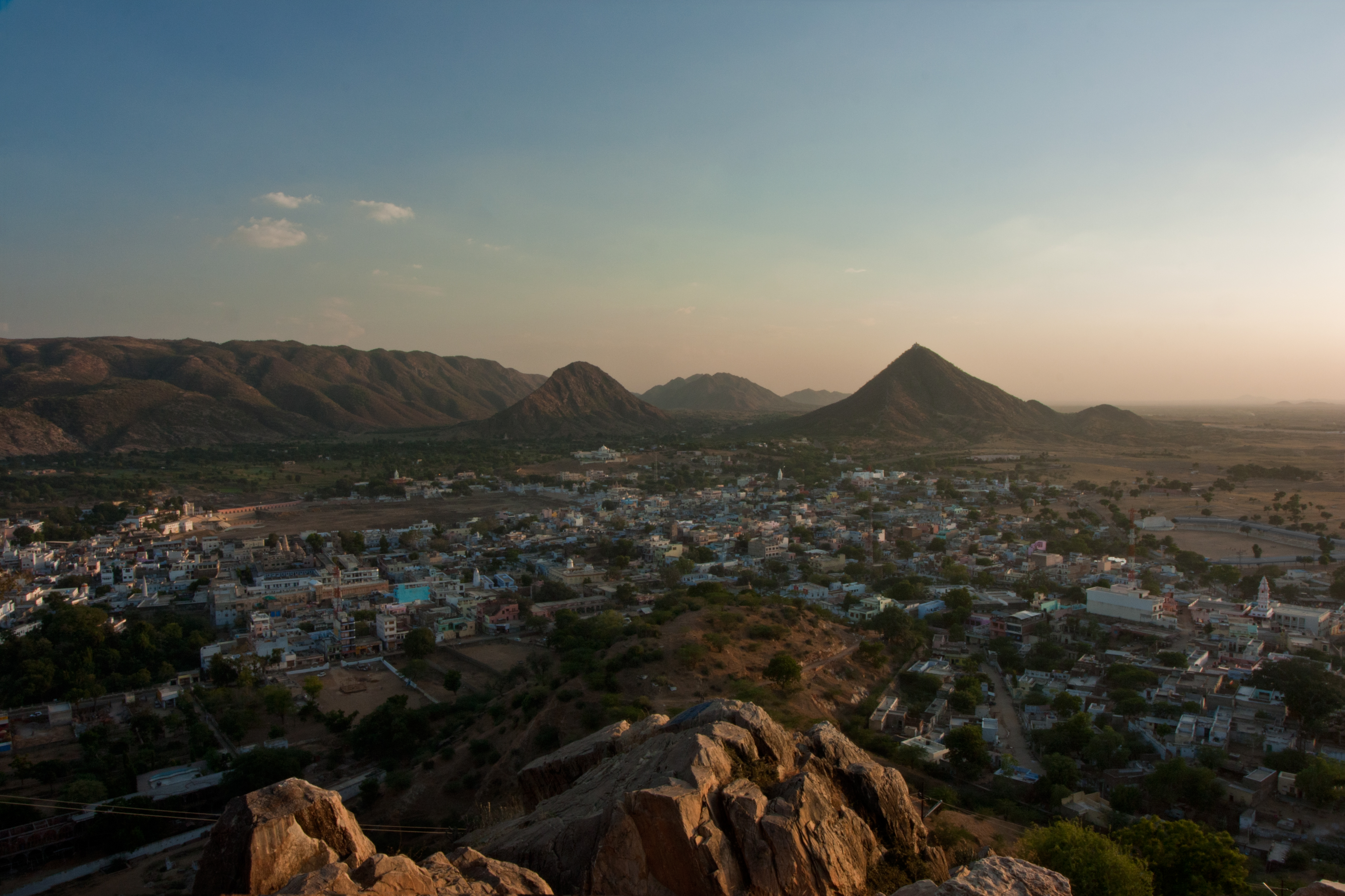 Pushkar from above, Rajastan, India